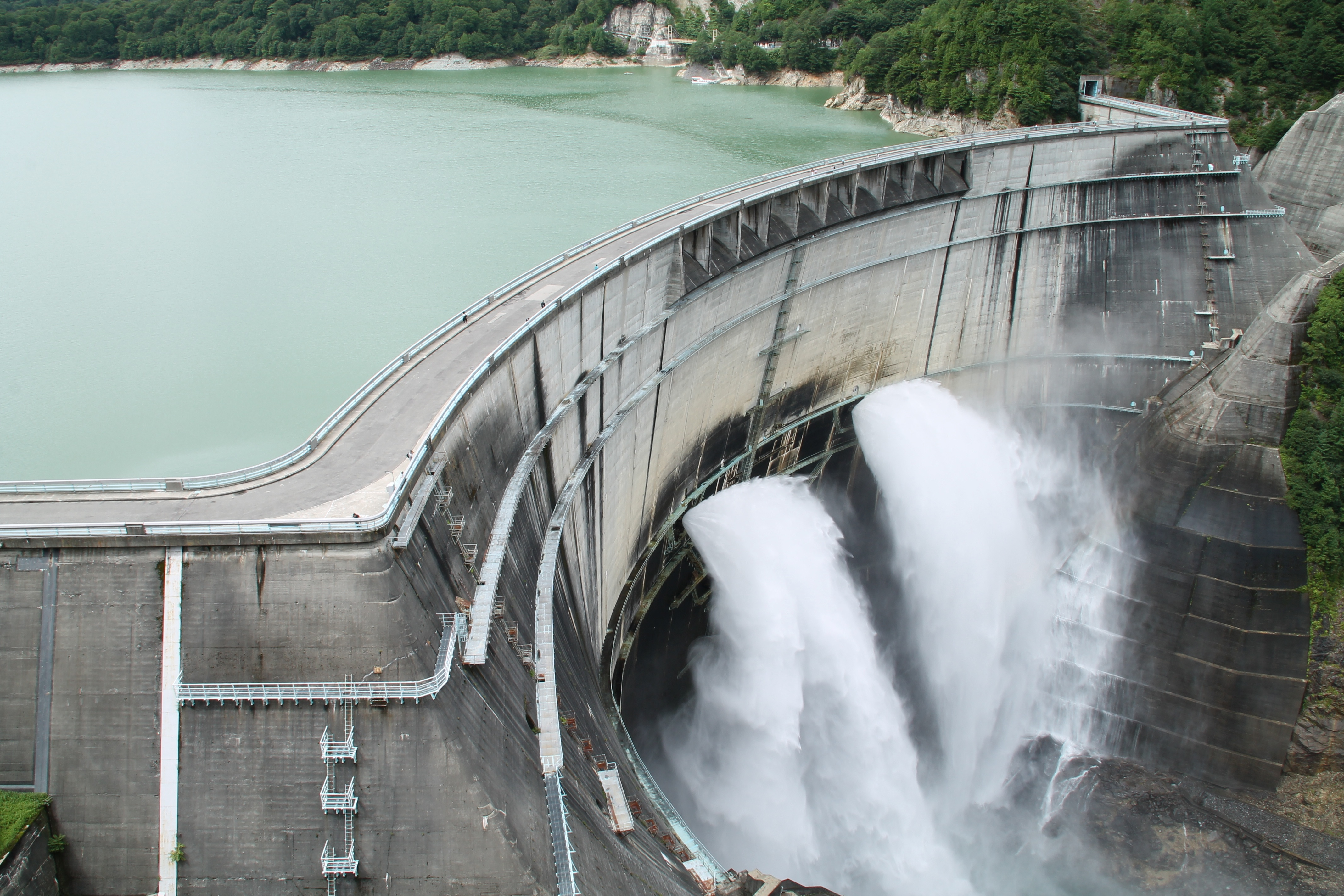 Kurobe Dam